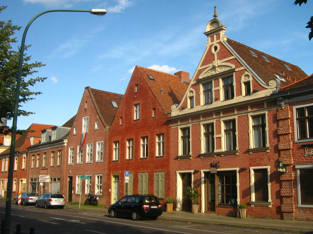 Potsdam, Holländisches Viertel an der Kurfürstenstraße.